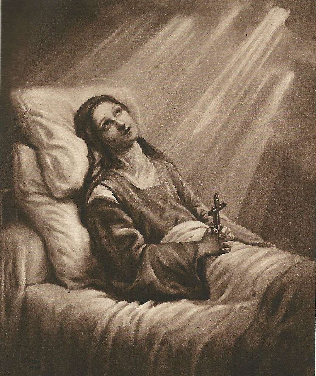 Gravure de "Sainte Thérèse de l'Enfant Jésus, Histoire d'une âme écrite par elle-même, Lisieux, Office central de Lisieux (Calvados), & Bar-le-Duc, Imprimerie Saint-Paul, 1937, édition 1940." Thérèse exhalant le dernier soupir.